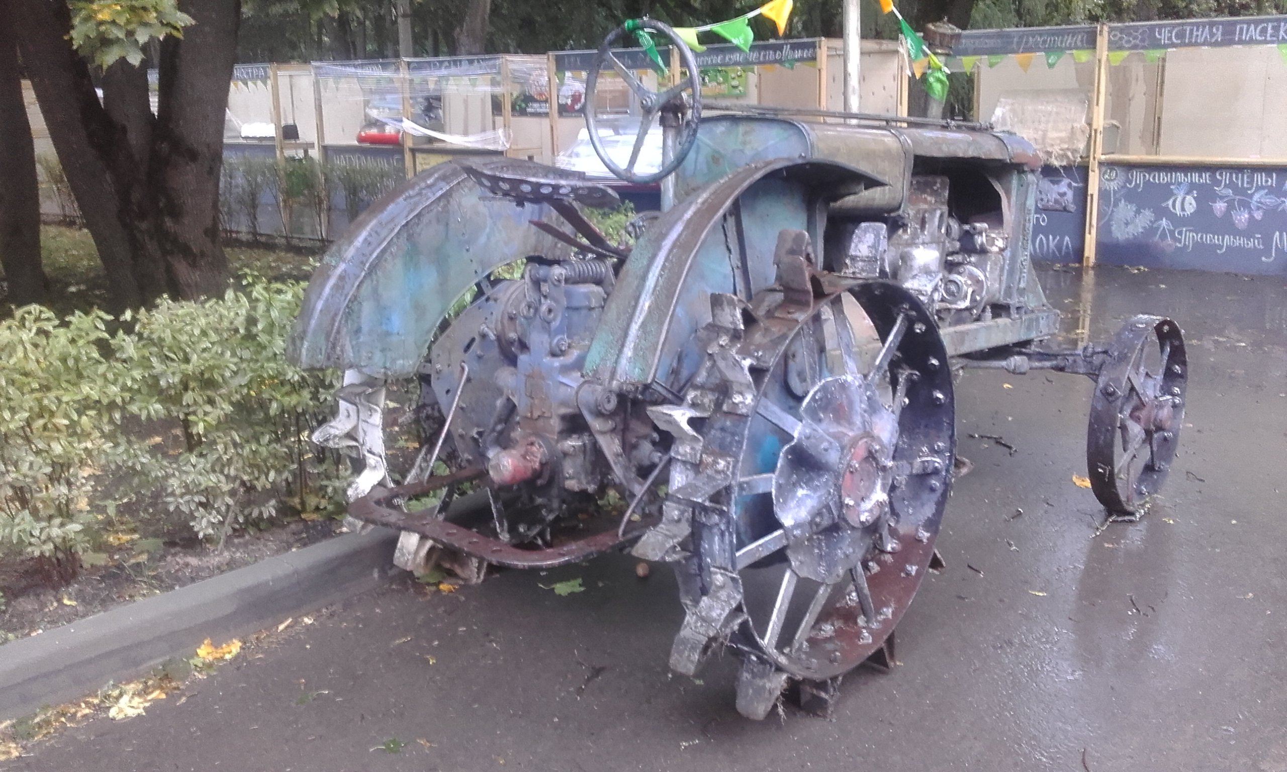 Трактор на выставке в Архангельском